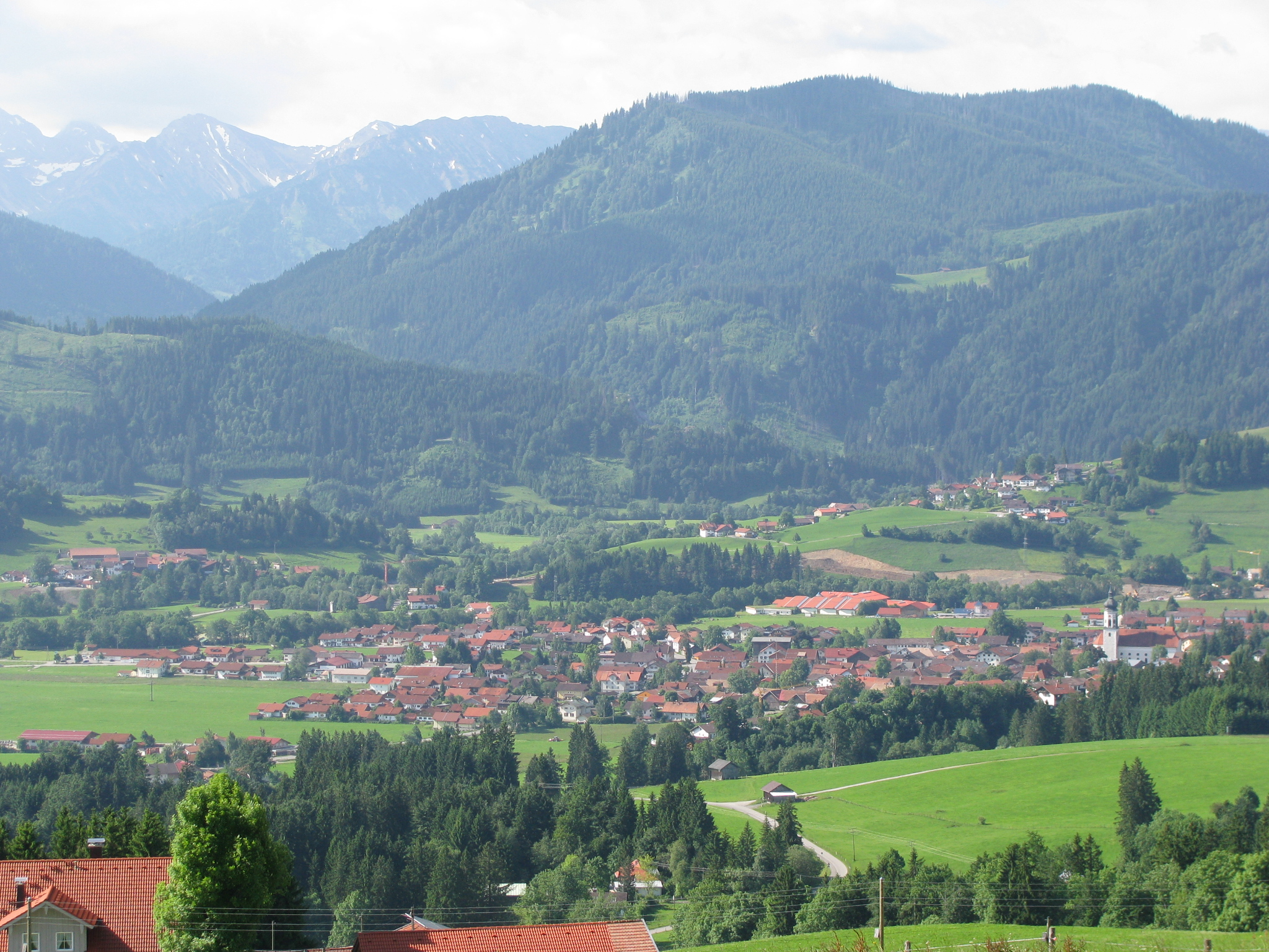 Wertach, Landkreis Oberallgäu, Bayern